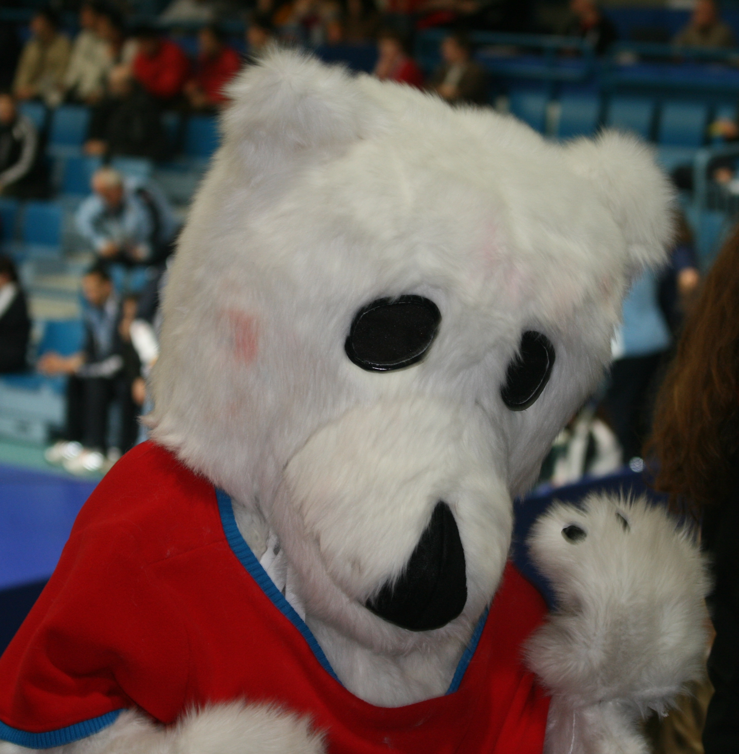 Isbjøren var maskot under EM i Håndball 2008